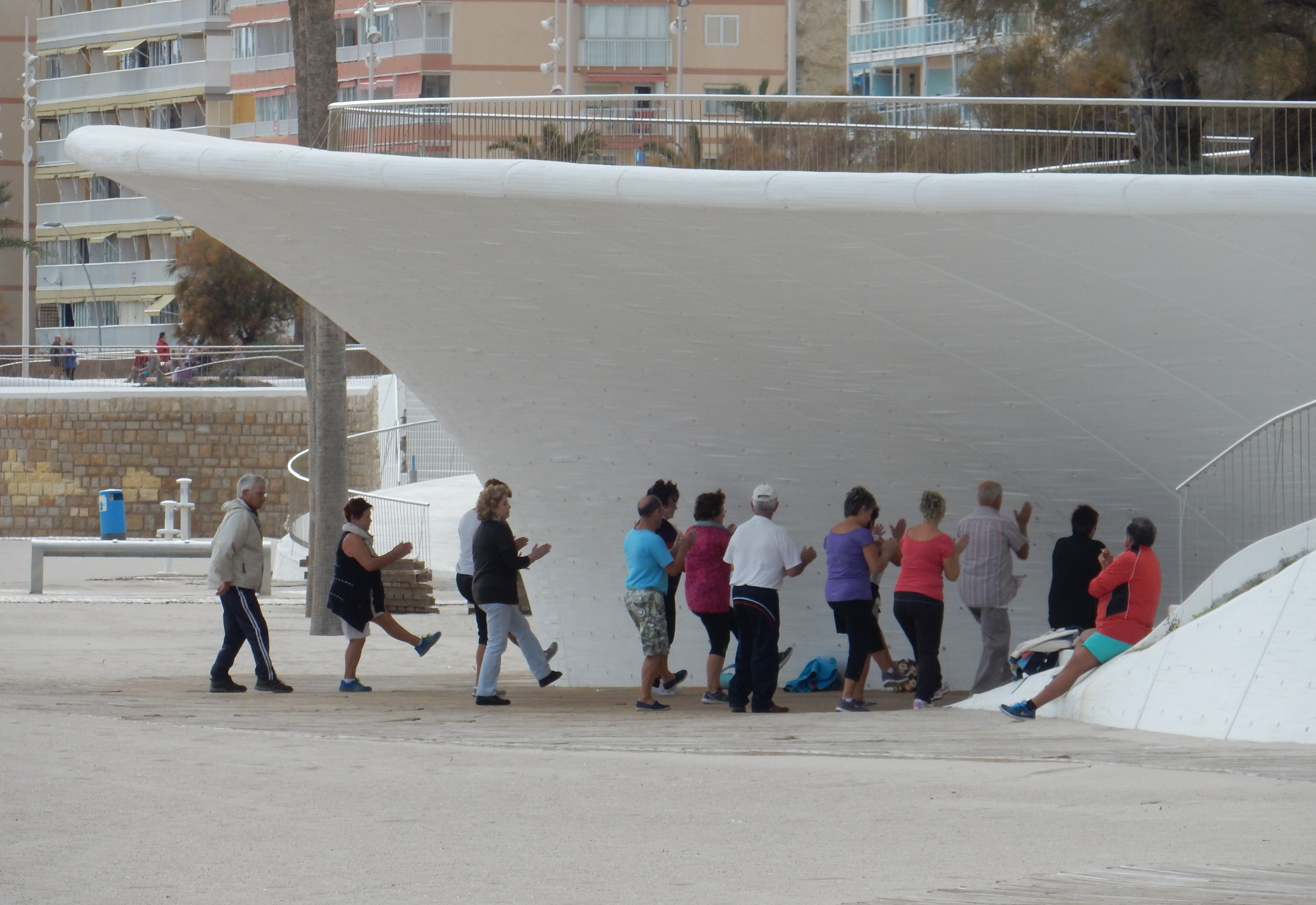 Benidorm, Spain